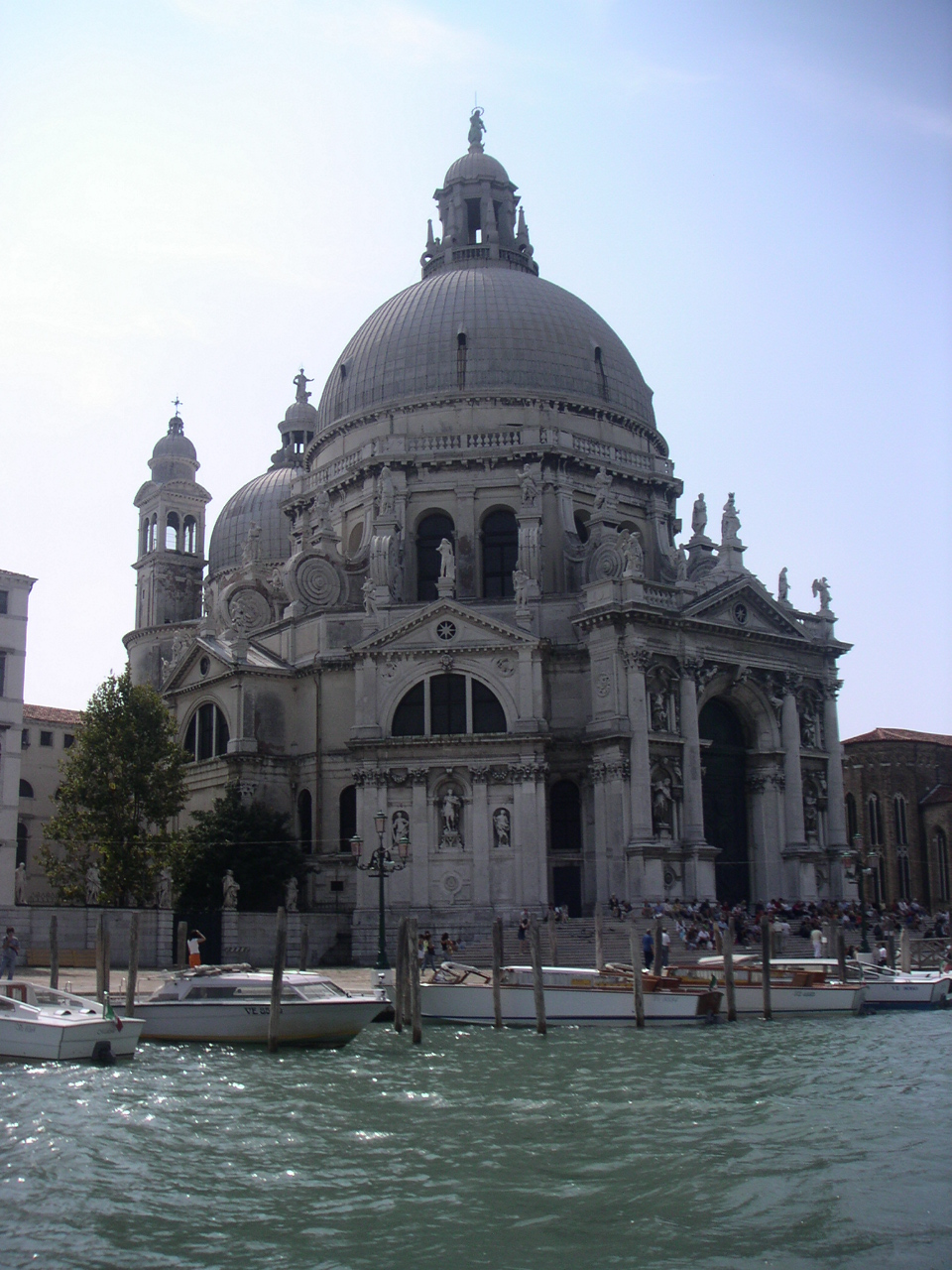 Kyrkan Santa Maria della Salute. Fotad från Canal Grande. Eget foto. Sommaren 2006. 1870s 2006